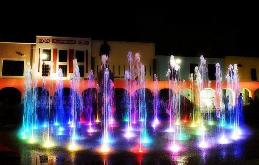 Fuentes "danzantes" en el parque Juárez de la ciudad de Villahermosa, estado de Tabasco, México.